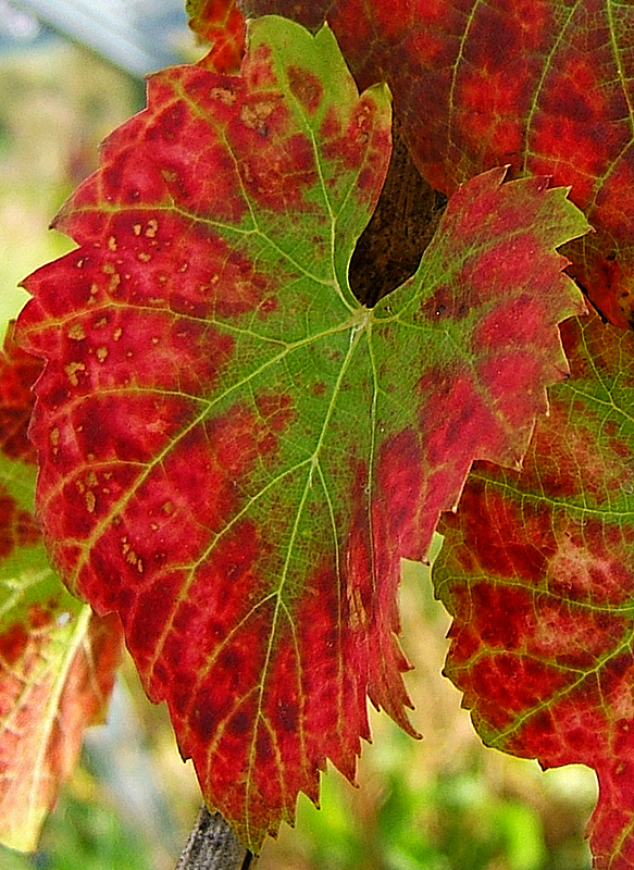 Vitis vinifera